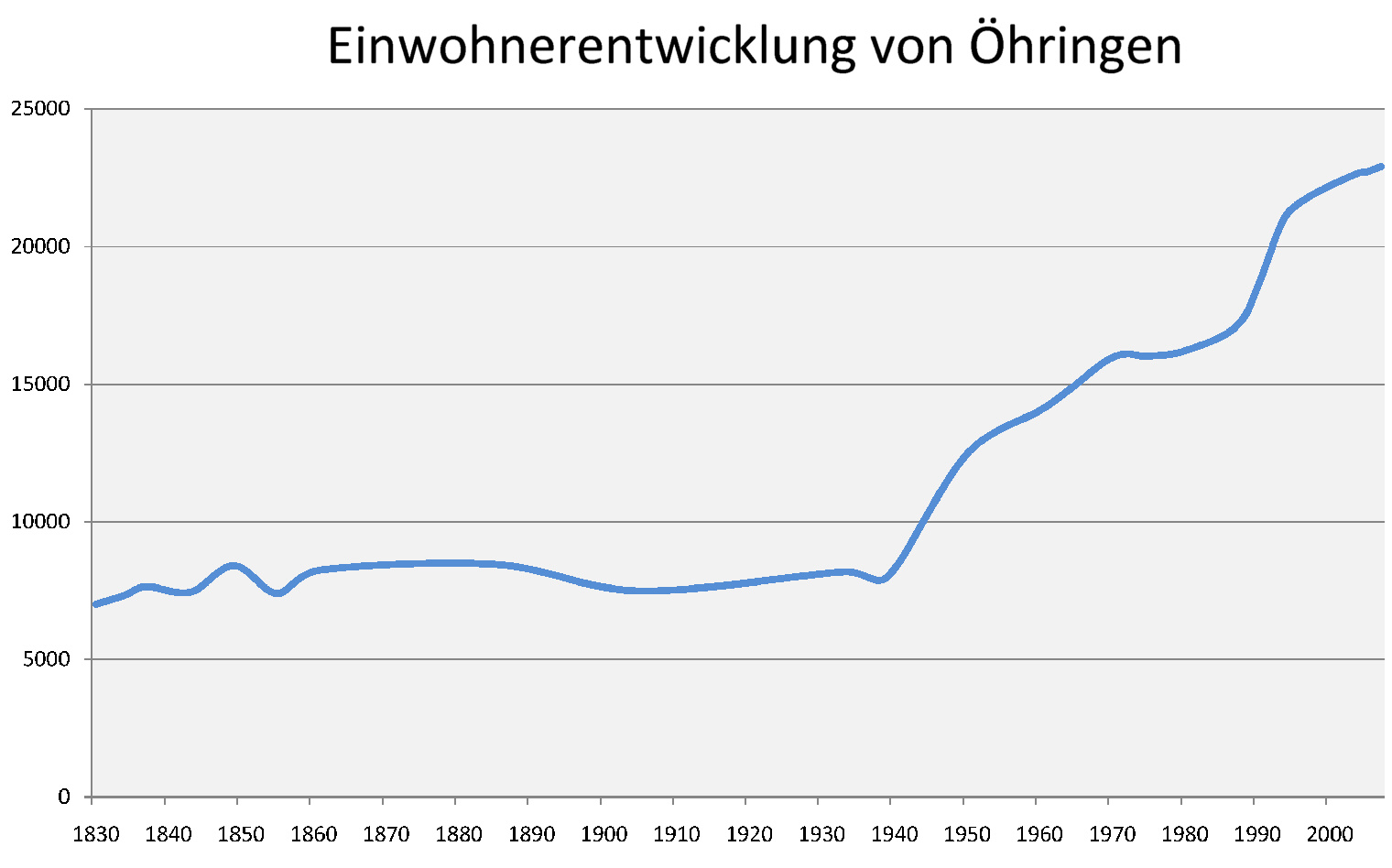 Grafische Darstellung der Einwohnerentwicklung der Stadt Öhringen von 1834 bis 2007. Die Daten vor den Eingemeindungen beziehen sich auf Öhringen und alle heutigen Stadtteile.